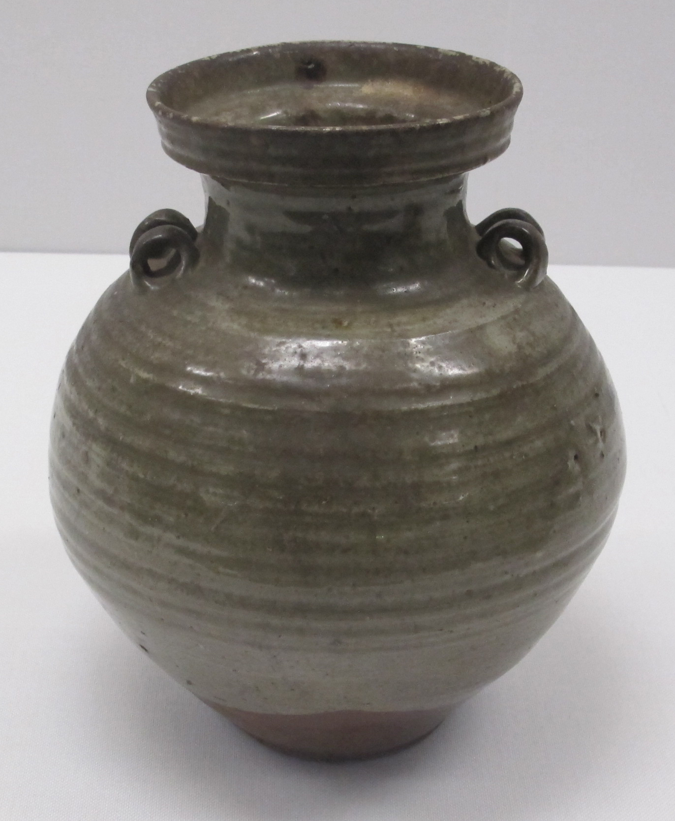 Dinastia tang, vaso con quattro manici, VII sec